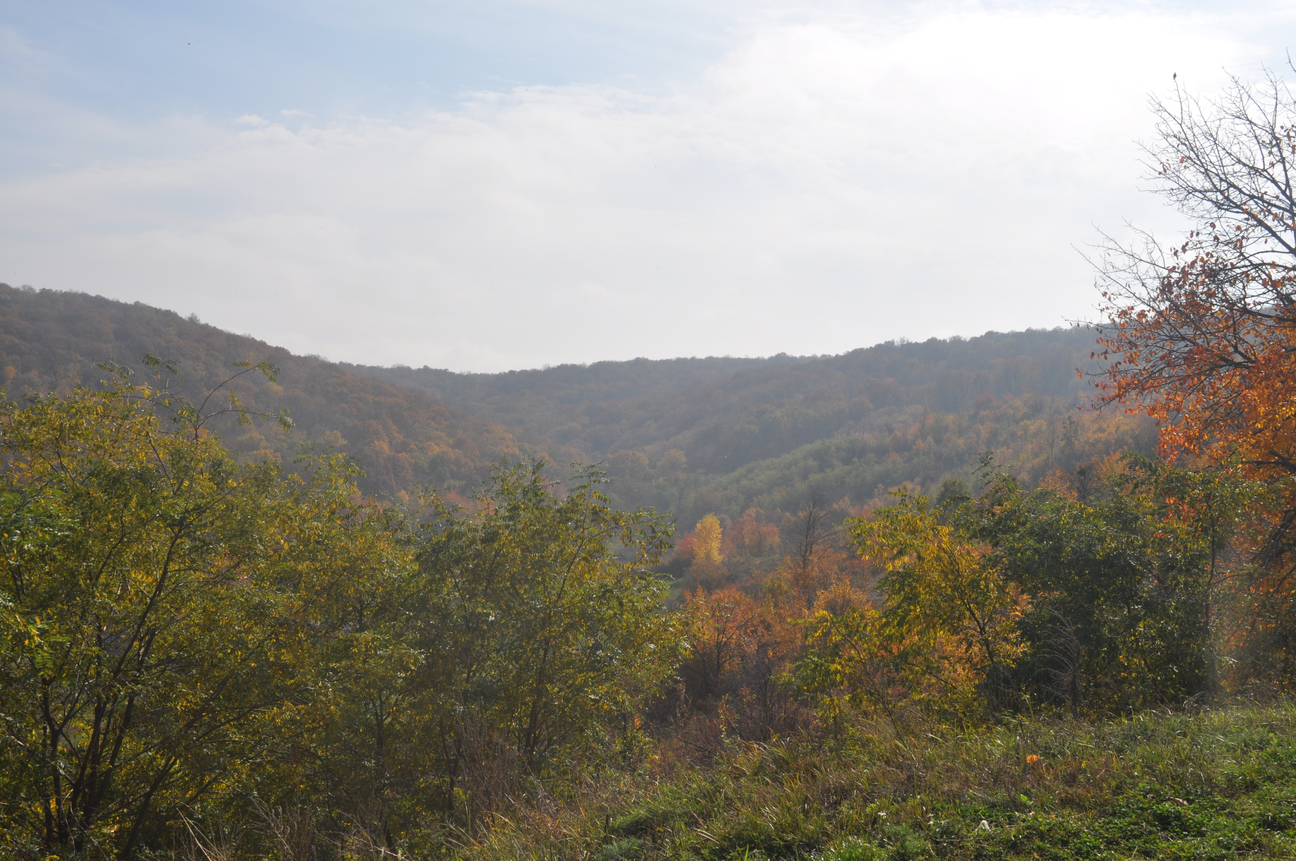 Căpriana – Scoreni, monument al naturii amplasat în raionul Strășeni, între satele Lozova, Vorniceni, Pănășești, Trușeni, Cojușna, ocolul silvic Căpriana, Căpriana, parcela 21, subparcelele 7-14; parcela 27, subparcelele 4-13; parcela 33, subparcelele 2, 3, 5; parcelele 28-30, 34-36; ocolul silvic Scoreni, Scoreni, parcelele 1-8 (cod MD-ST-rp-037)